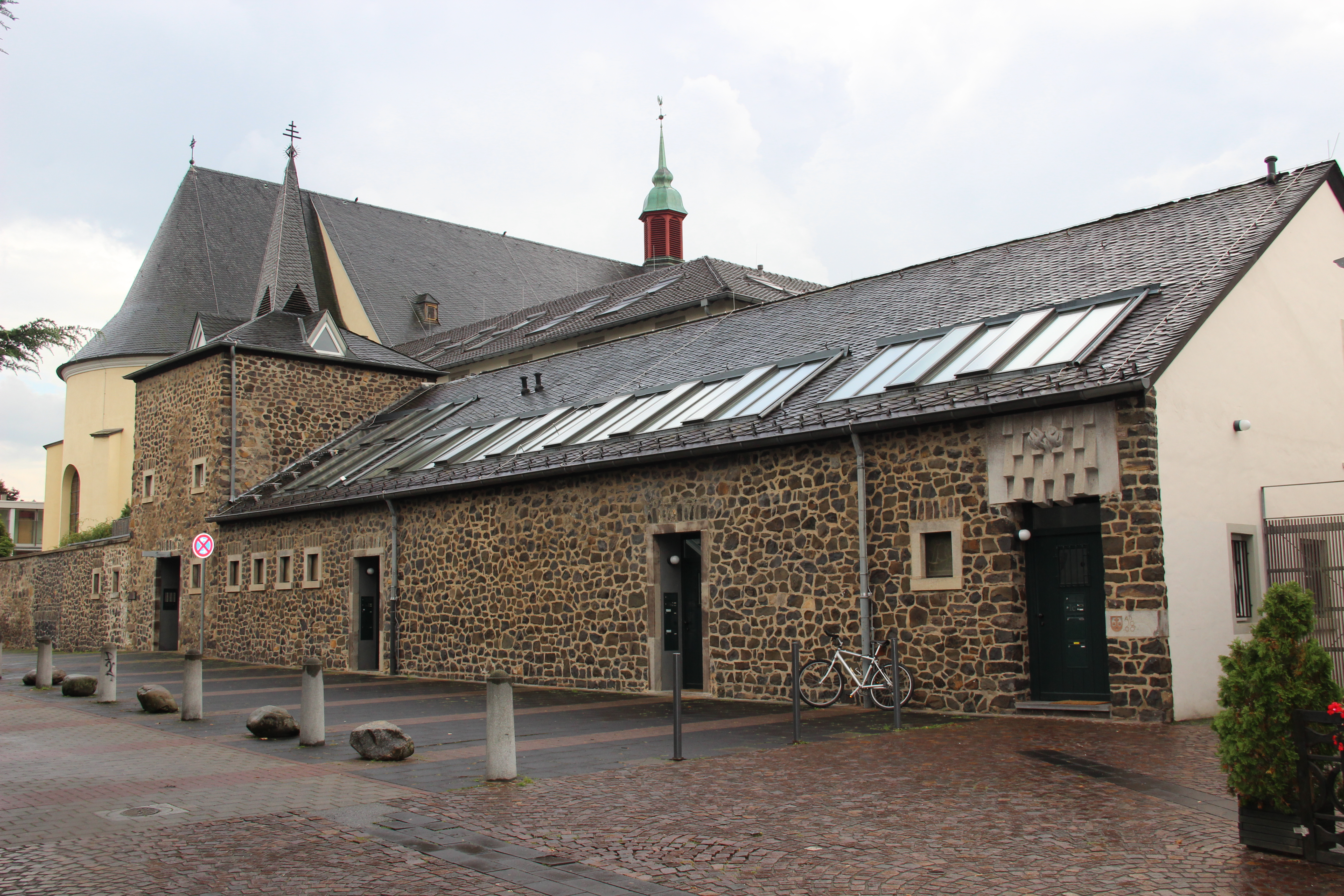 Ehemalige Klosteranlage „Karmel Sankt Joseph“, Karmeliterstraße 1/1d/1e, Bonn-Pützchen